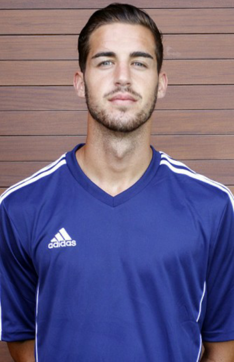 El jugador